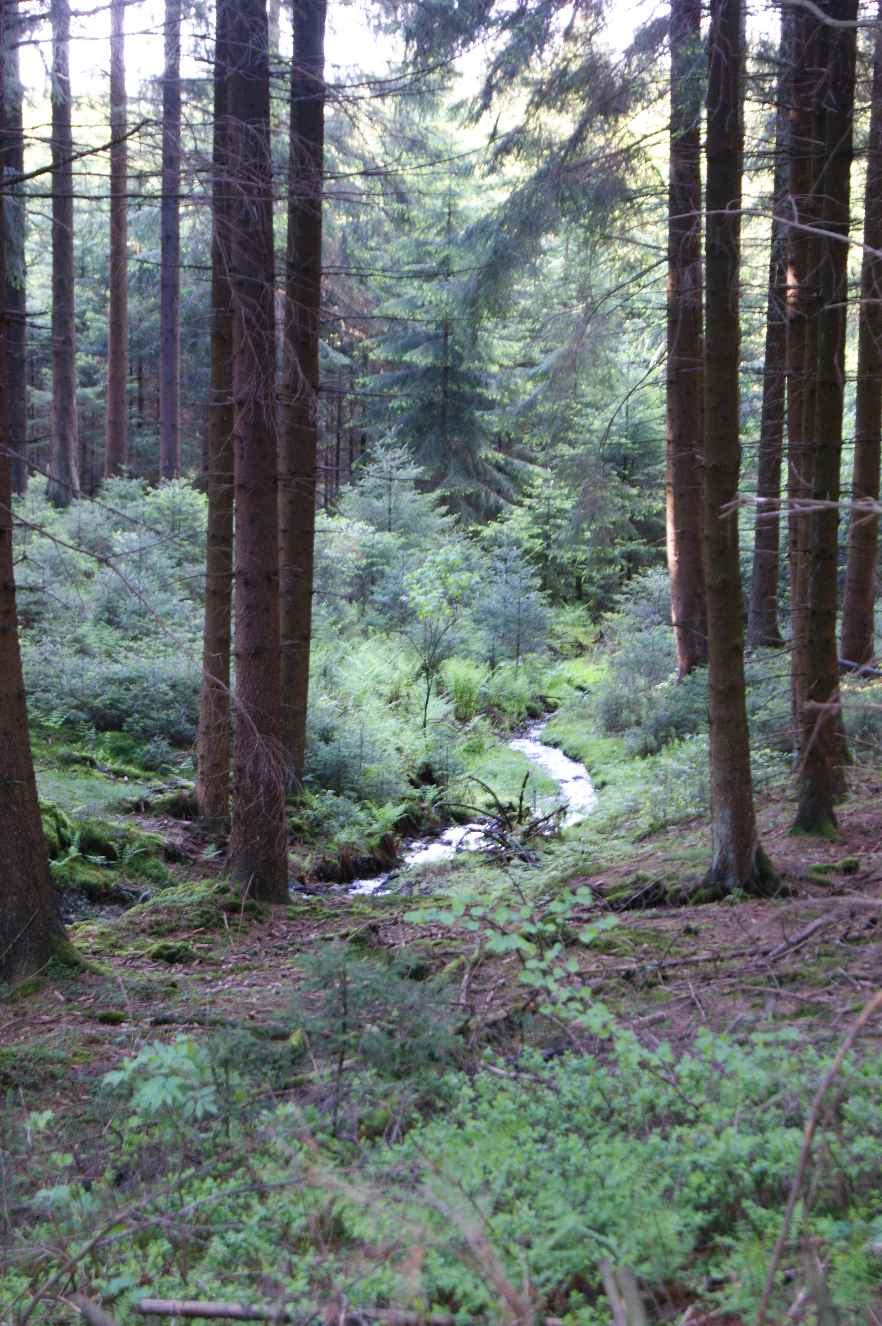 Naturschutzgebiet Dollenbruch; Kirchhundem, Kreis Olpe, Reg.-Bez. Arnsberg, Nordrhein-Westfalen, Deutschland